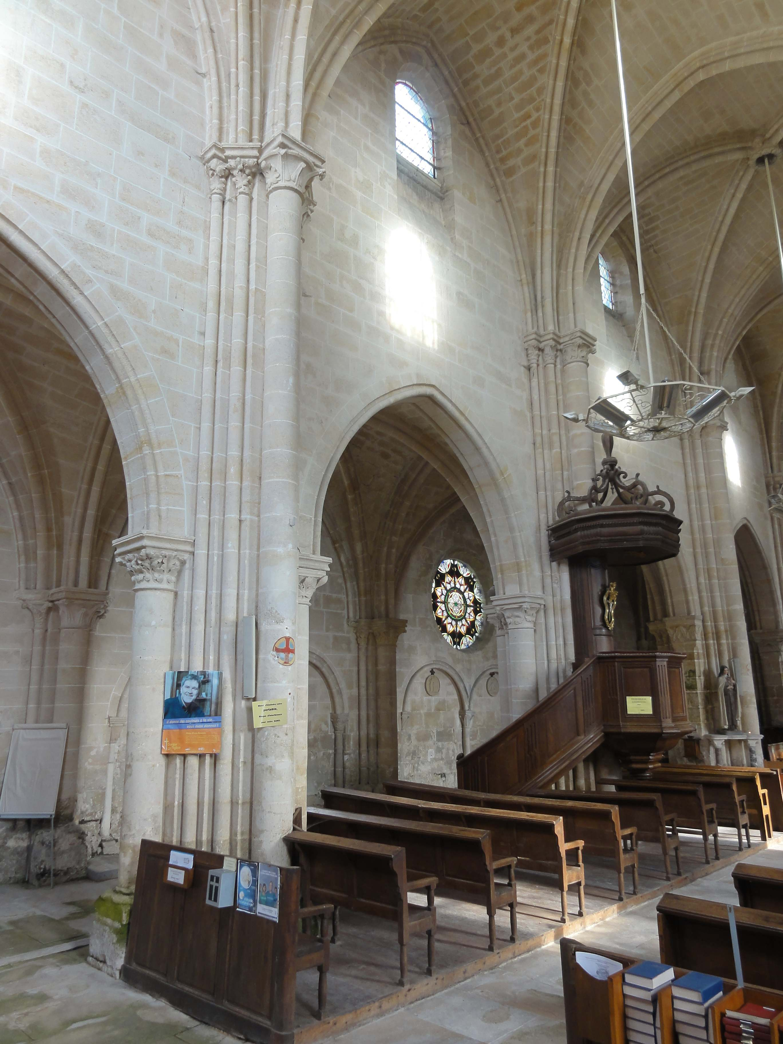 Intérieur de l'église - voir titre.